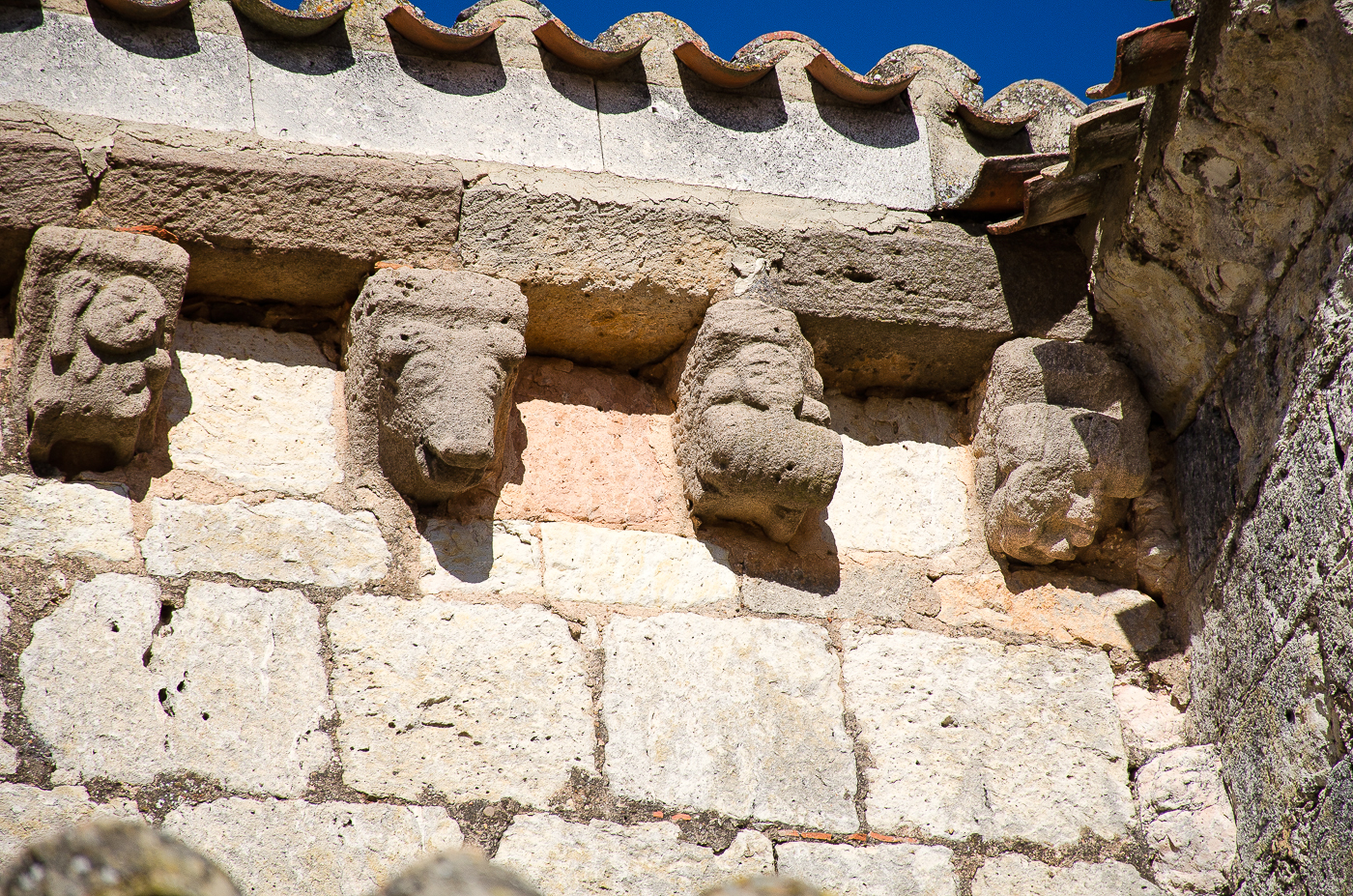 Dolio (instrumento musical). Canecillo en la iglesia de San Pedro de Sandoval de la Reina. Tercero empezando por la izquierda. Intérprete de dolio. Siglo XII.